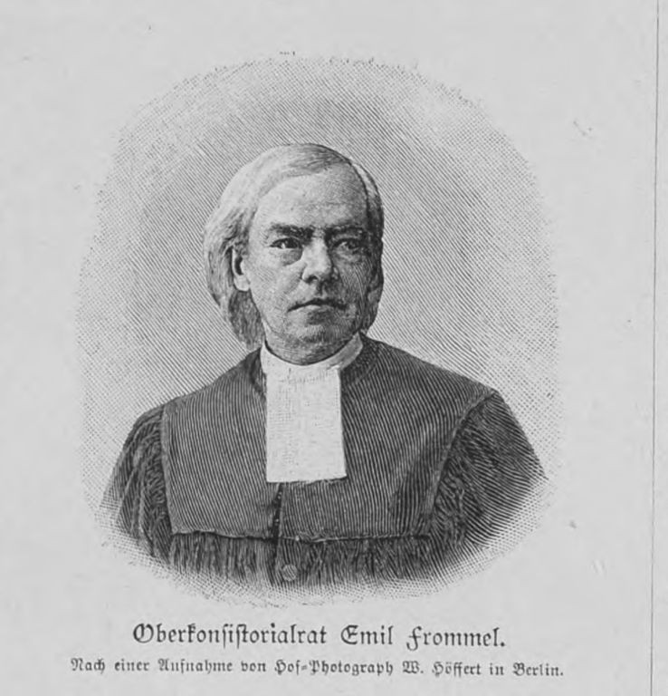 Aus Jahrbuch der Berliner Morgenzeitung, Kalender 1898 Scan --Goerdten 23:16, 18. Jan. 2007 (CET), dasselbe Bild in "Über Land und Meer" Bd. 77 (1896-1897), S. 150